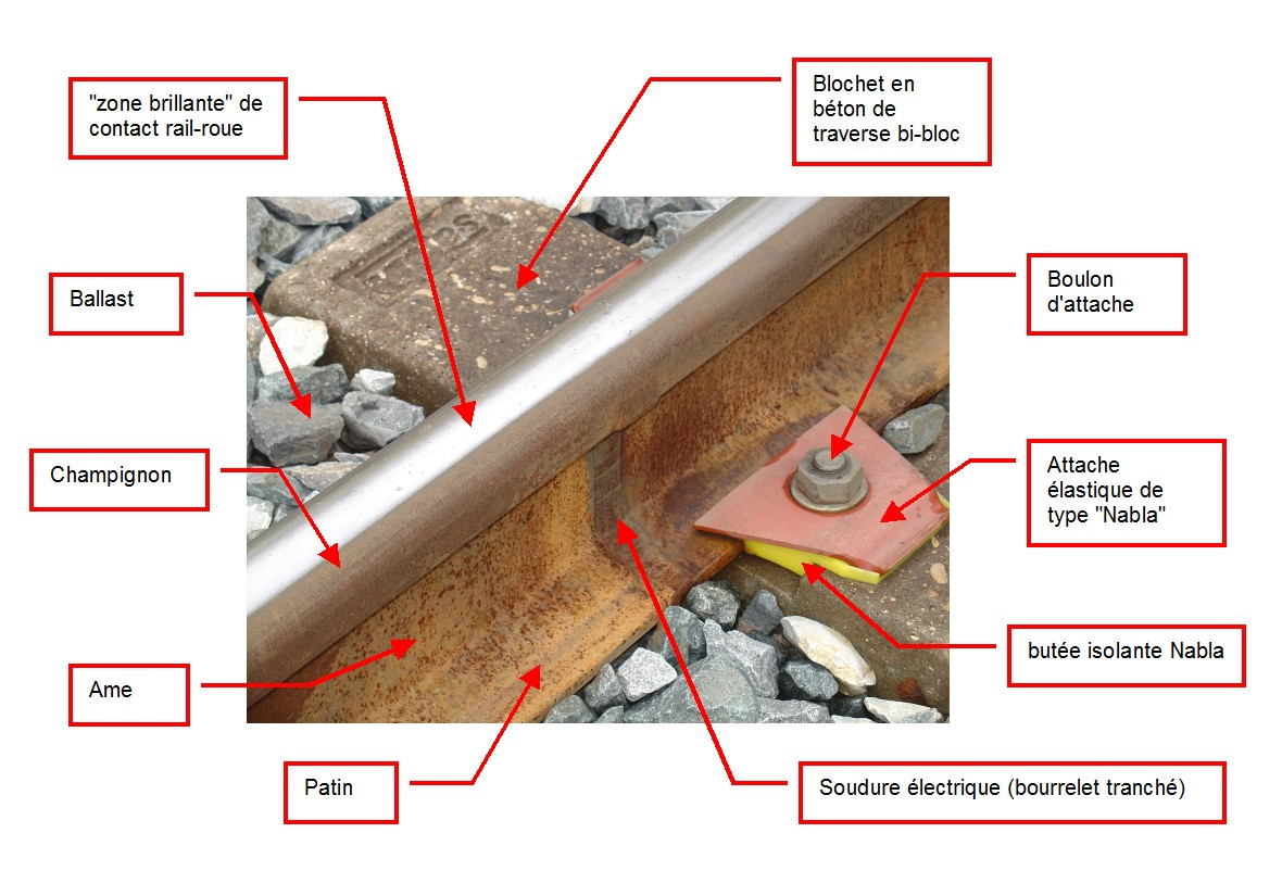 parties d'une voie de chemin de fer